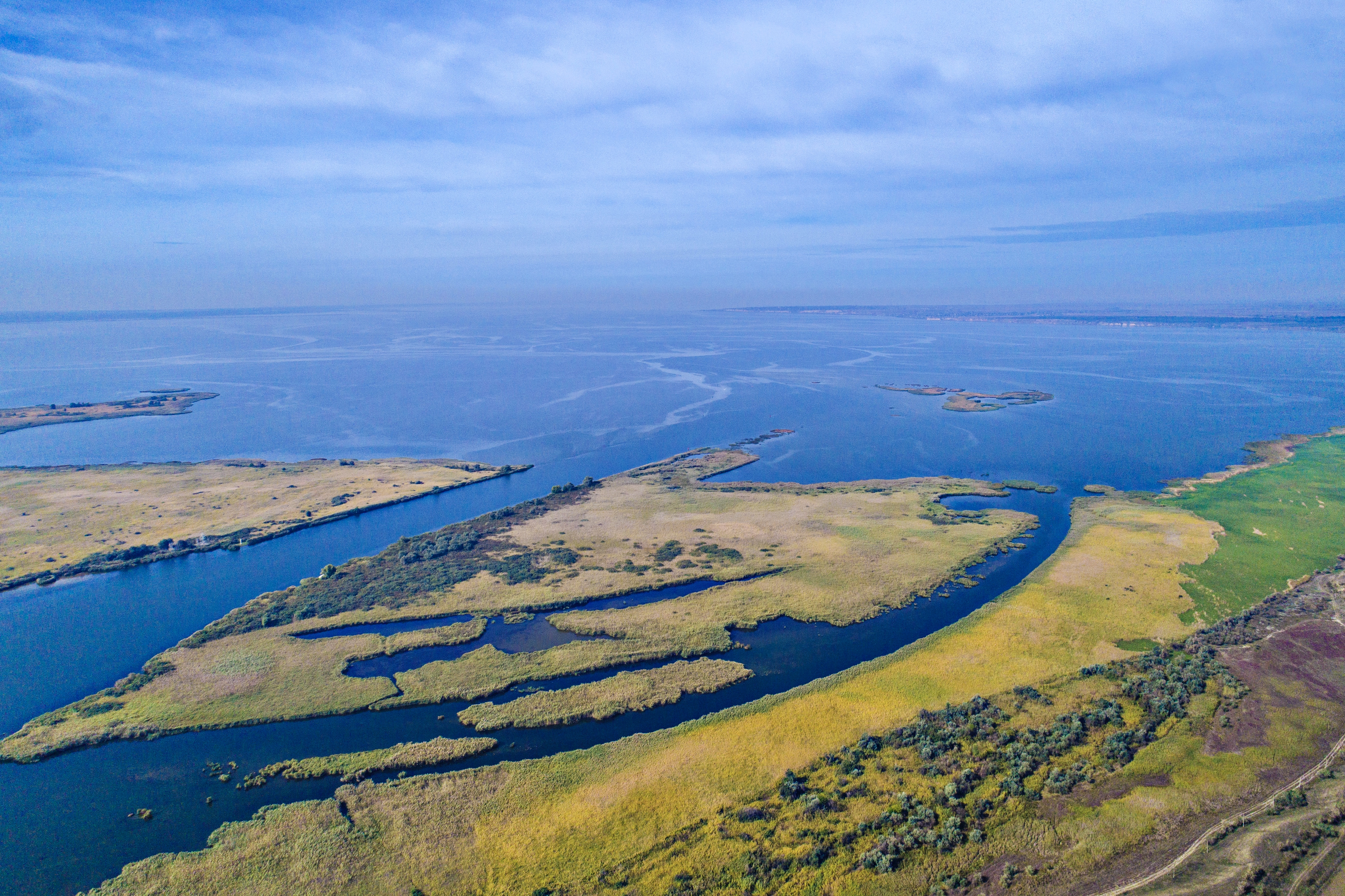 Бакайський жолоб. Возле села Кизомыс, Херсонской области